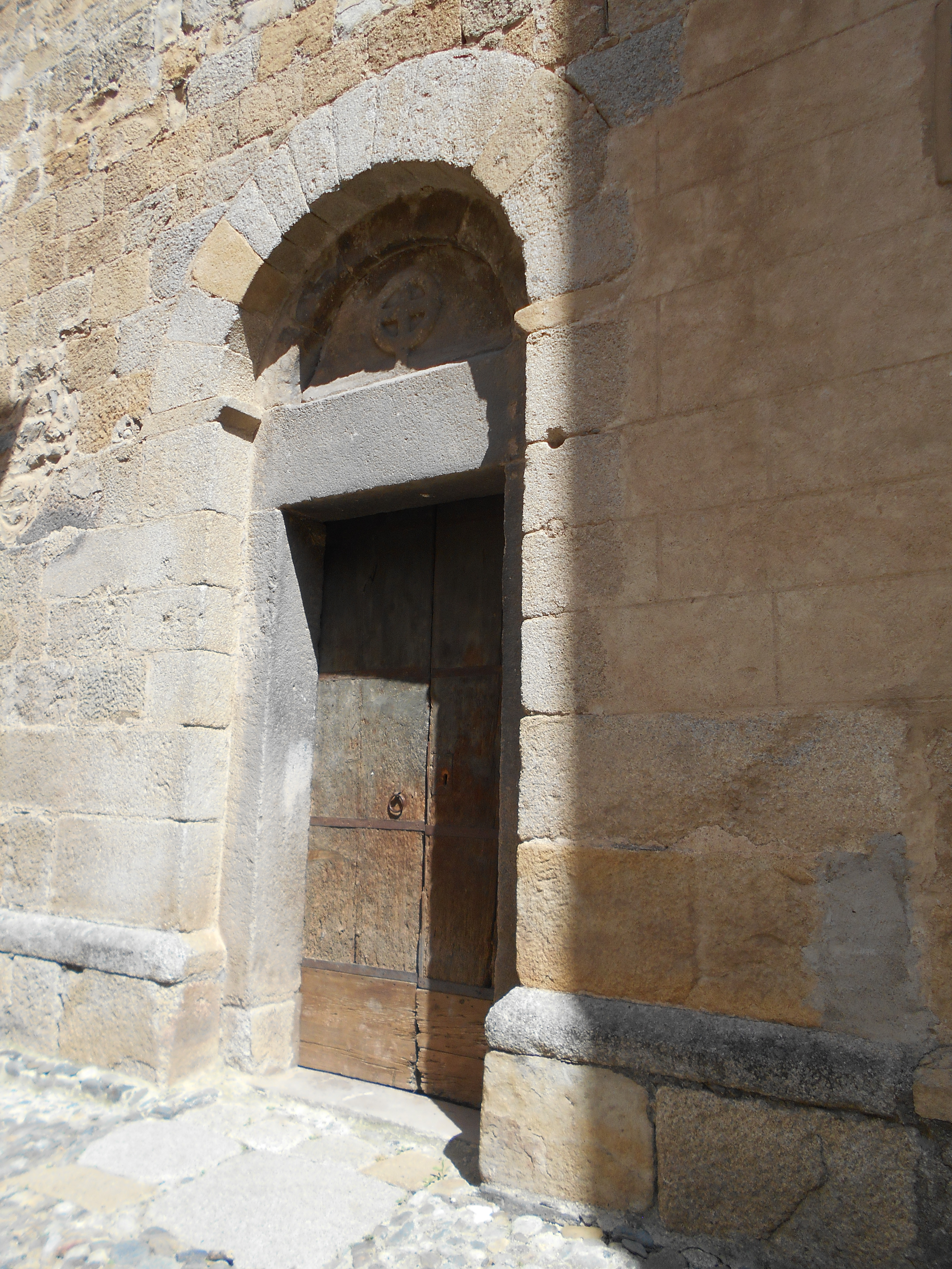 Portalada romànica de Sant Andreu de Catllà